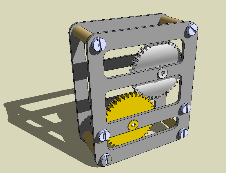 modèle de mécanisme réalisé avec Google SketchUp réalisation personnelle